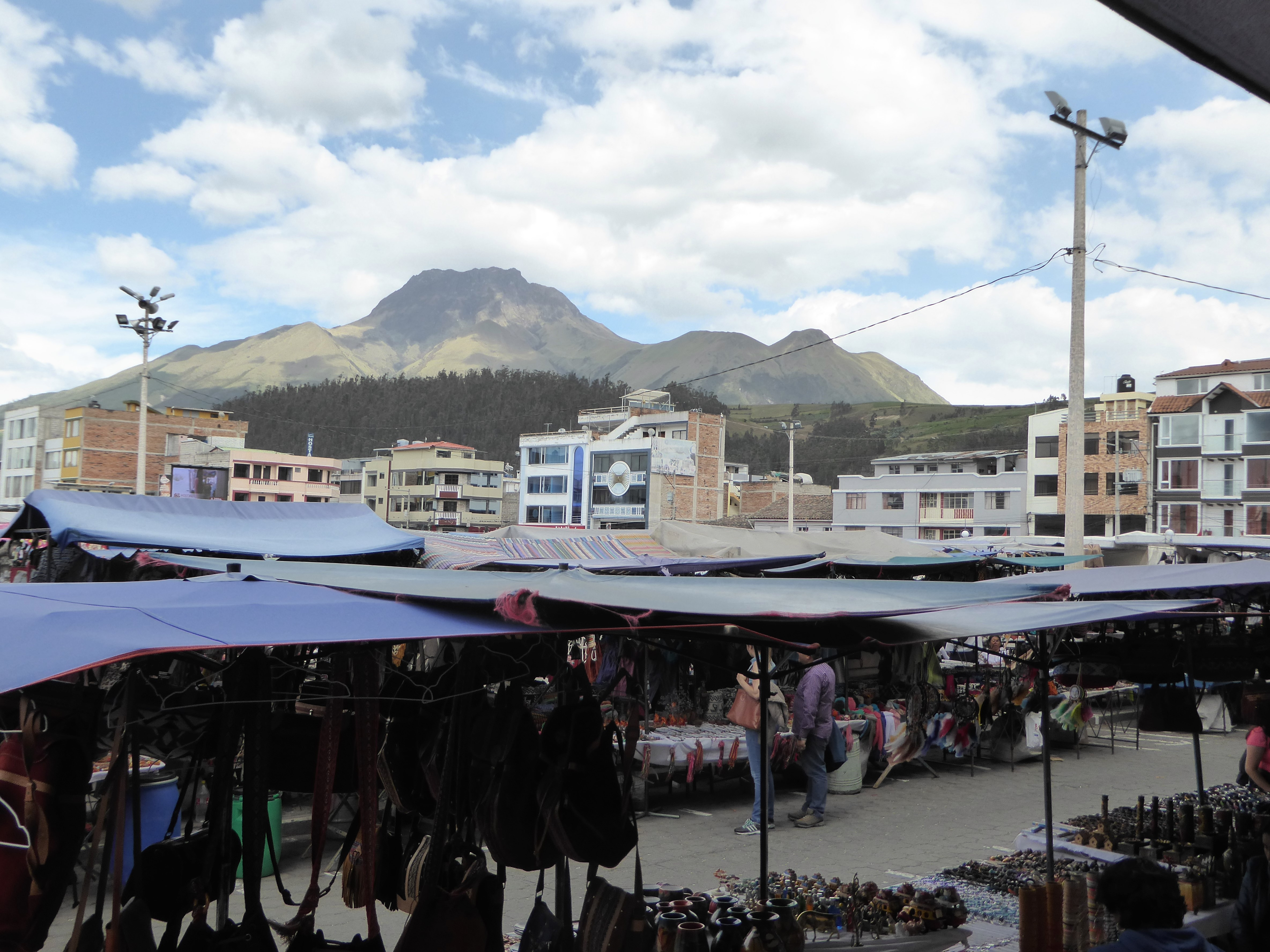 Kunsthandwerkermarkt auf der Plaza de los Ponchos mit Imbabura im Hintergrund